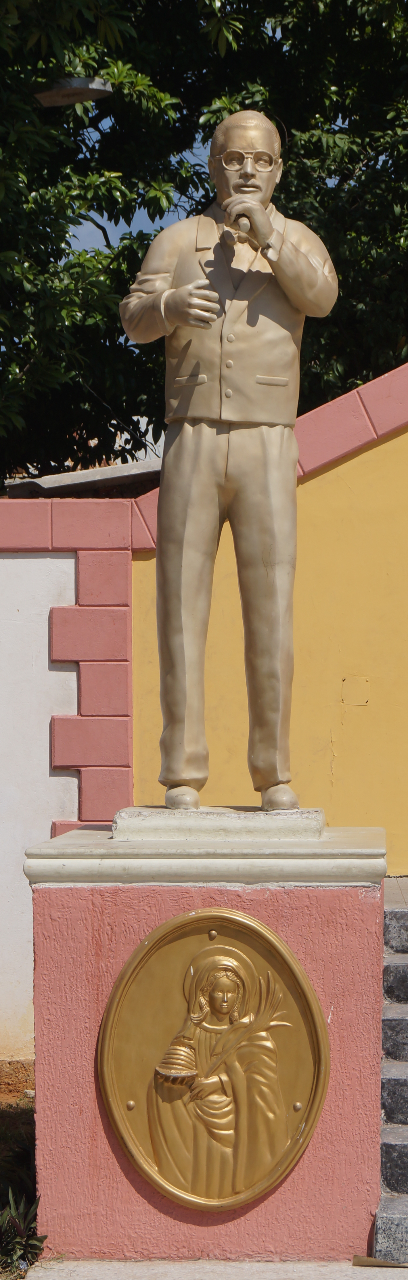 Figura